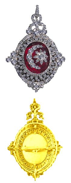 Orde van de Halve Maan, Ottomaanse onderscheiding